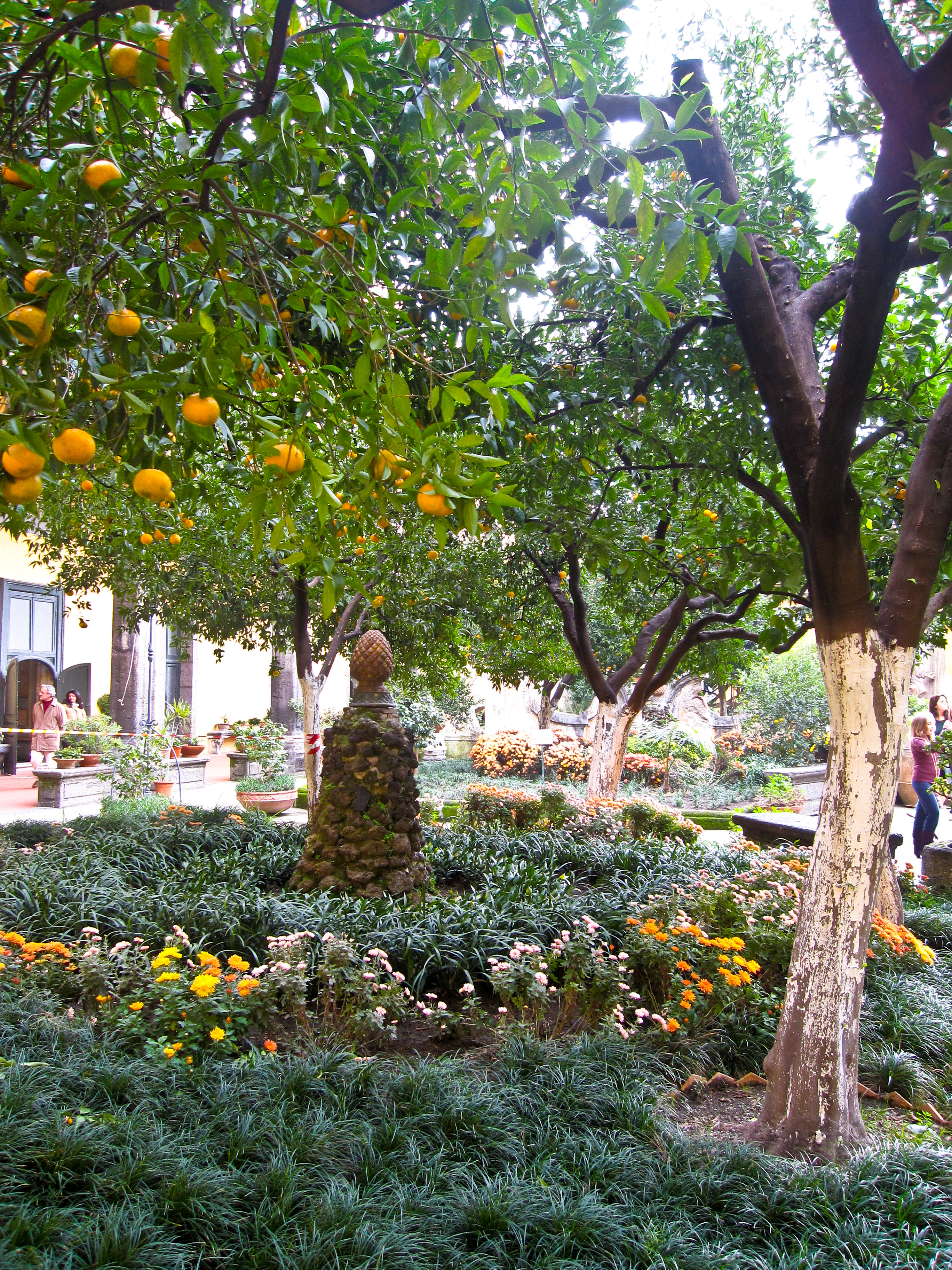 Particolare del Chiostro di San Gregorio Armeno Napoli.